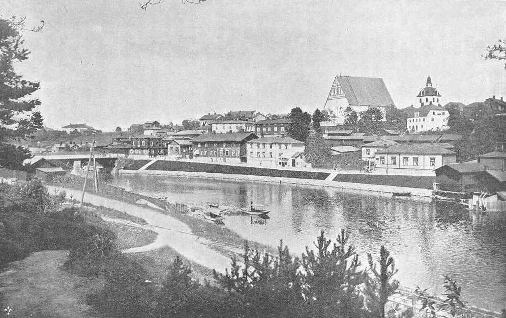 Borgå. View from Näsebacken